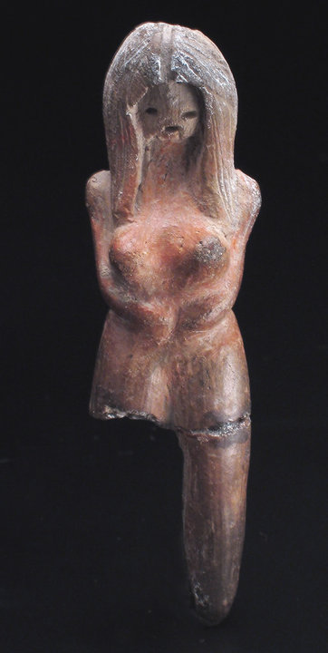 Figurilla femenina de Valdivia (3.900 a.cC)